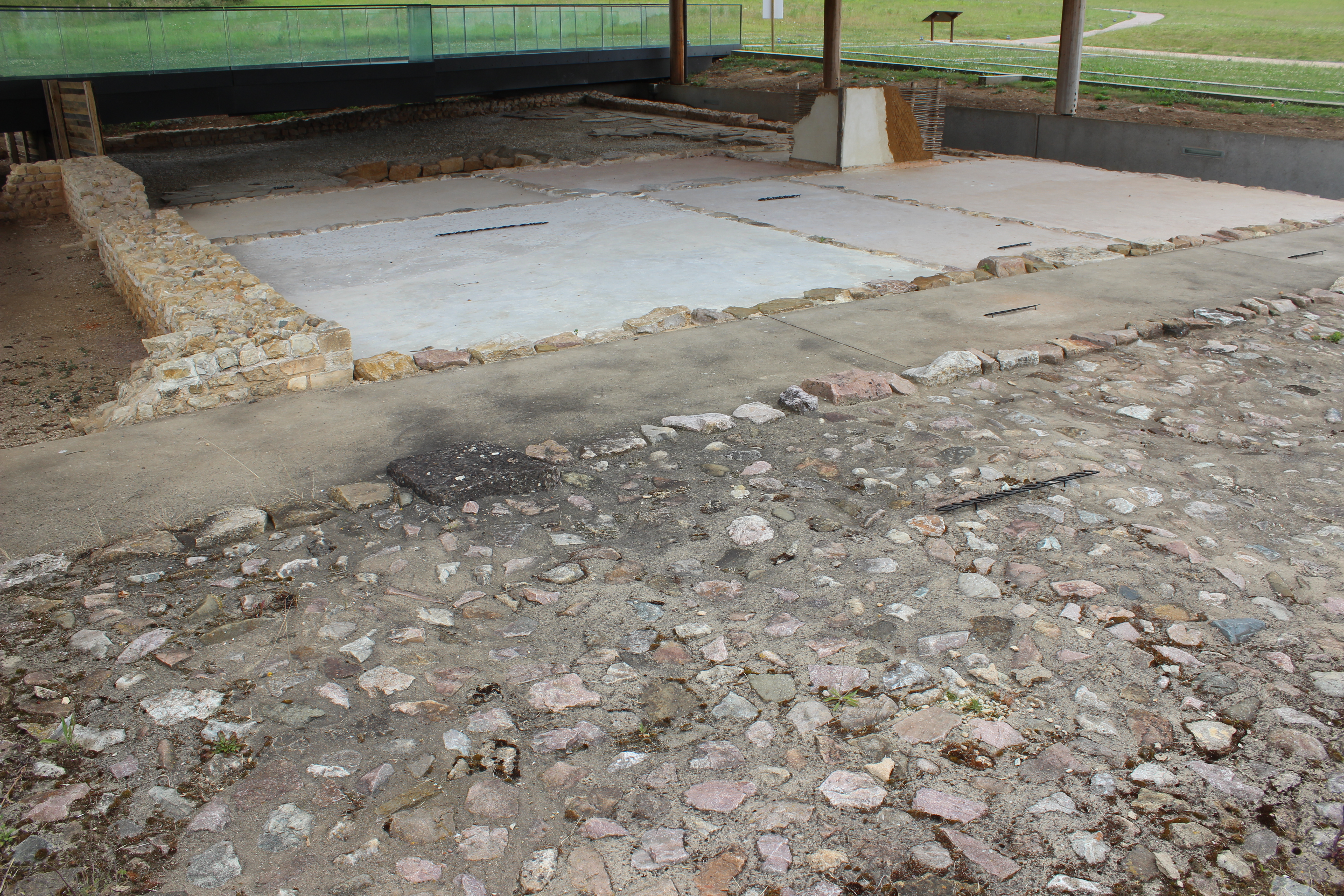 maison à la cour en U de Vieux la romaine